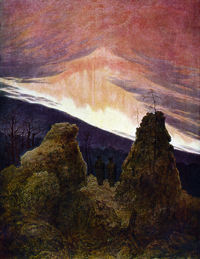 Aurora boreal, de Caspar David Friedrich, pintado hacia 1830-1835. La obra quedó destruida o desapareció en mayo de 1945, finalizada la Segunda Guerra Mundial en Alemania. - Dimensiones: 141 x 109 cm - Pintura al óleo sobre lienzo